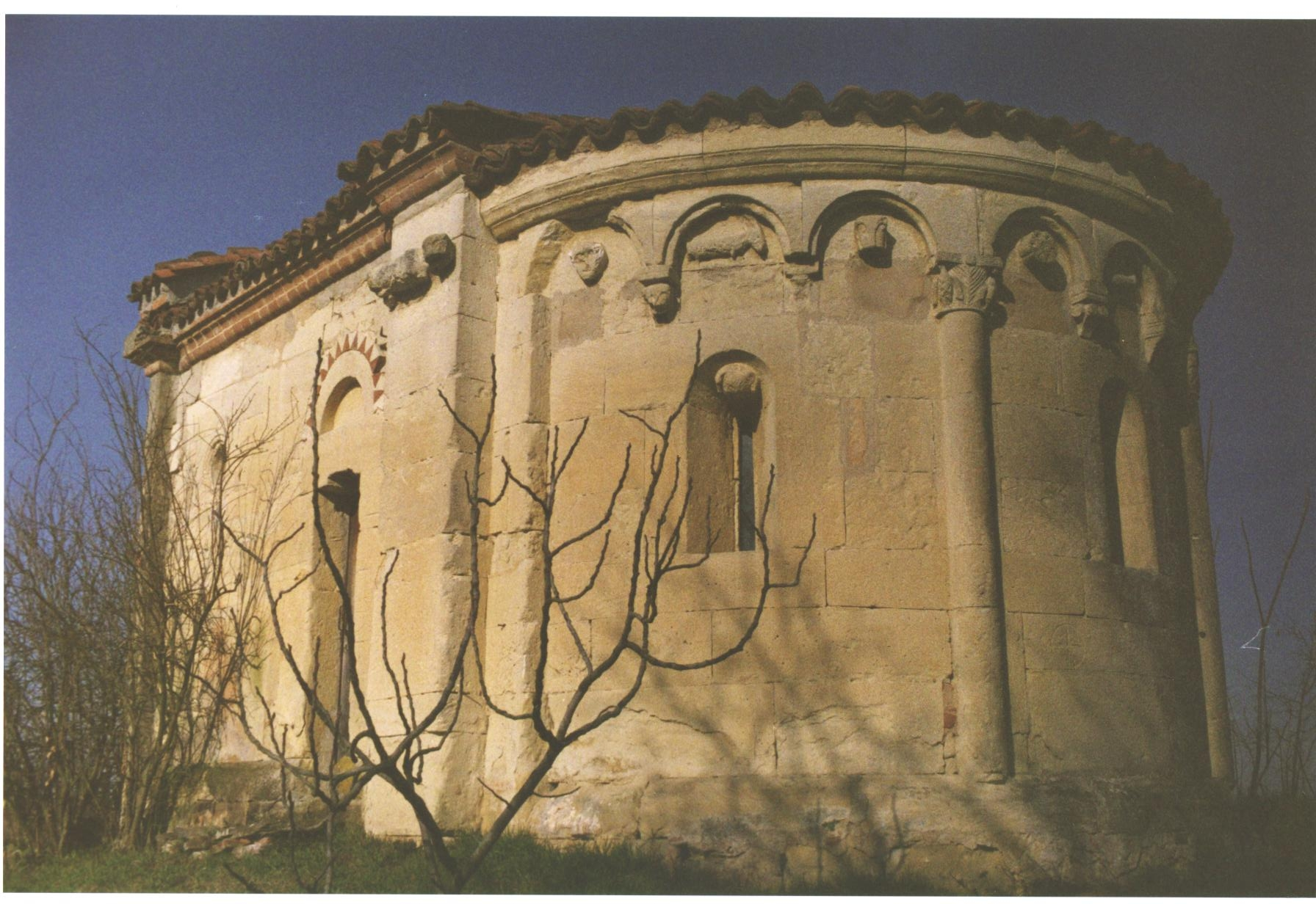 Viarigi (AT). Chiesetta romanica di San Marziano.